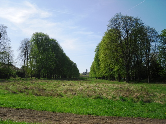 L'allée des marronniers de Longpont-sur-Orge